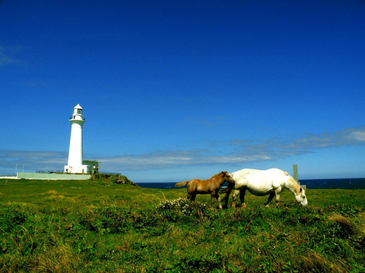 尻屋崎と寒立馬